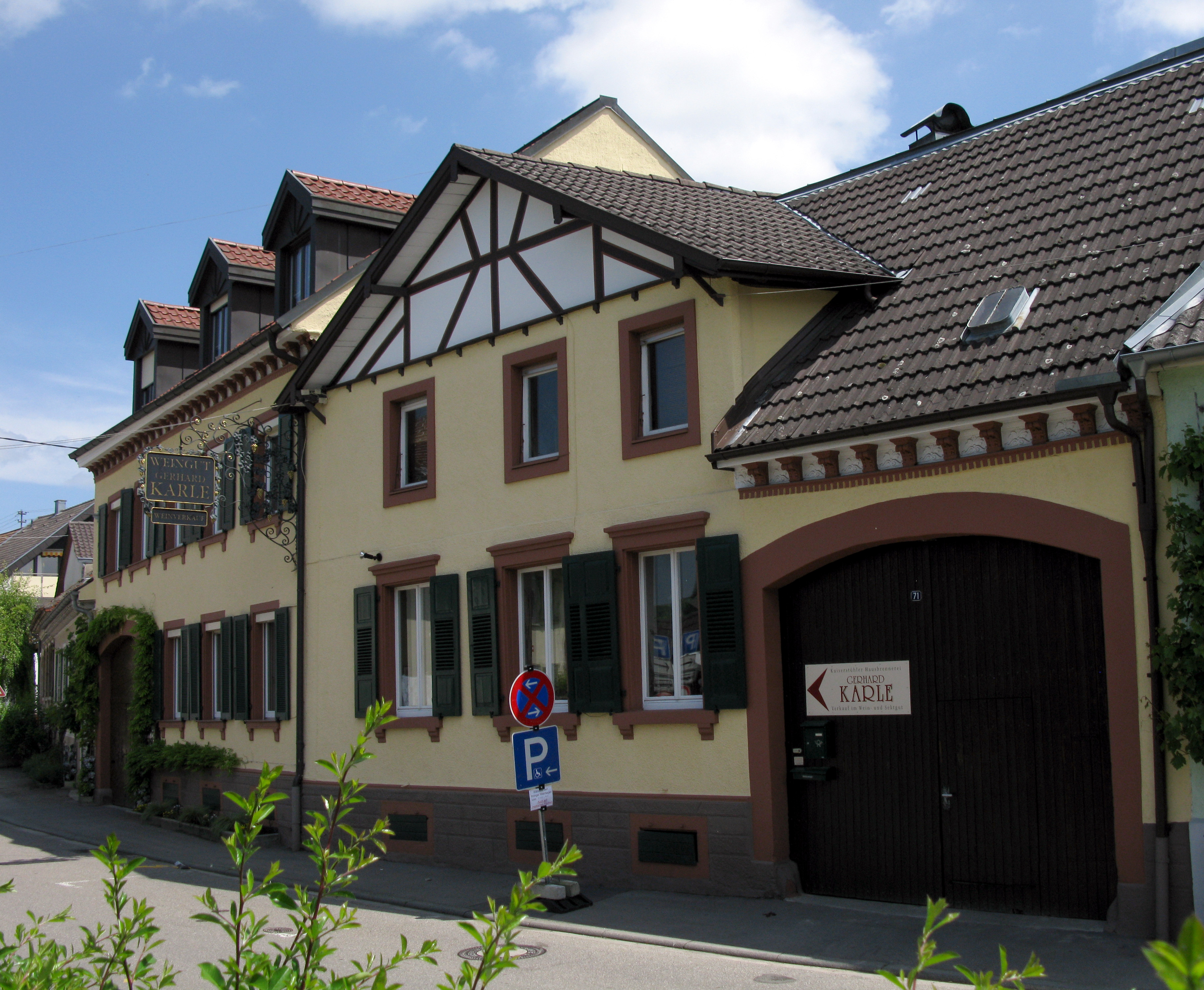 Sekt- und Weingut Karle in Ihringen